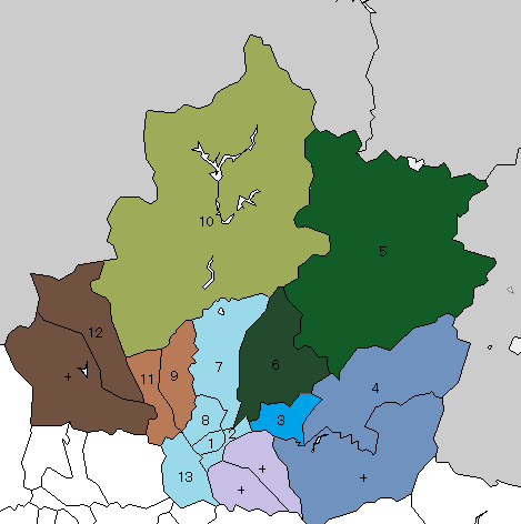 群馬県利根郡